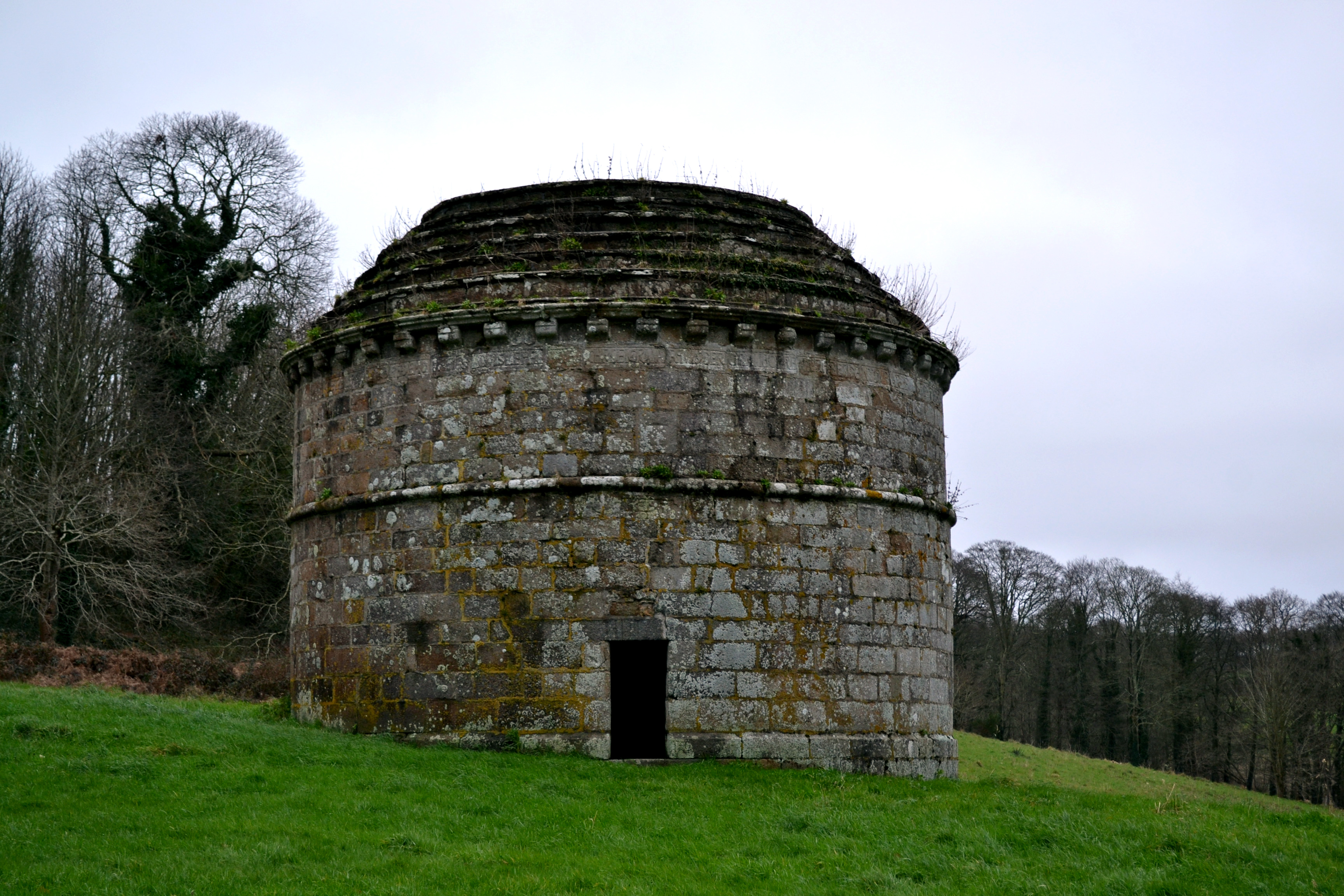 Château de Rosanbo à Lanvellec dans le pays du Trégor (Côtes d'Armor).